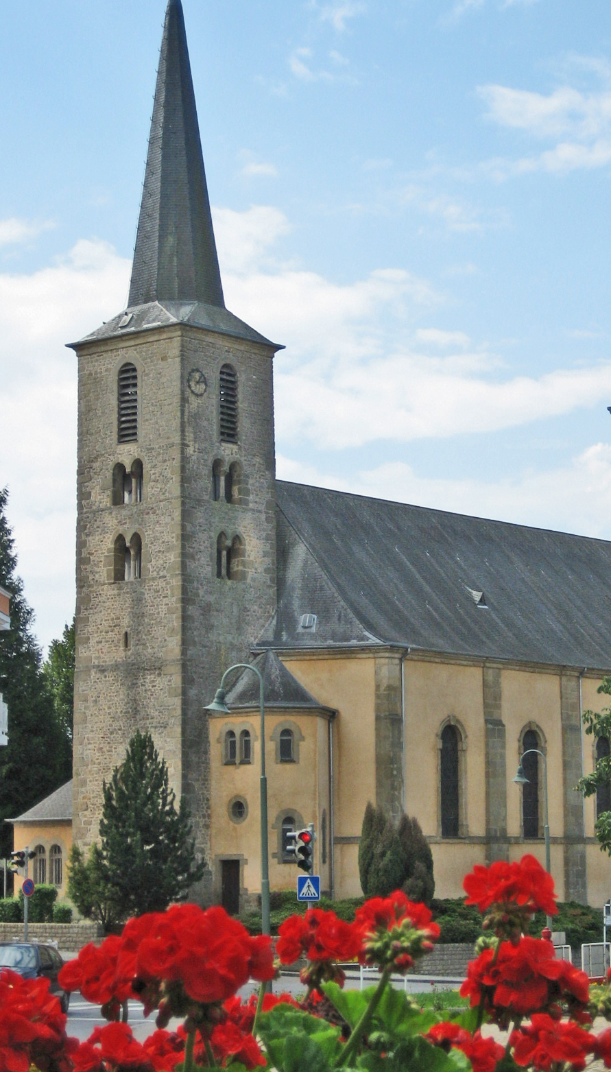 L'église de Consdorf (Luxembourg)